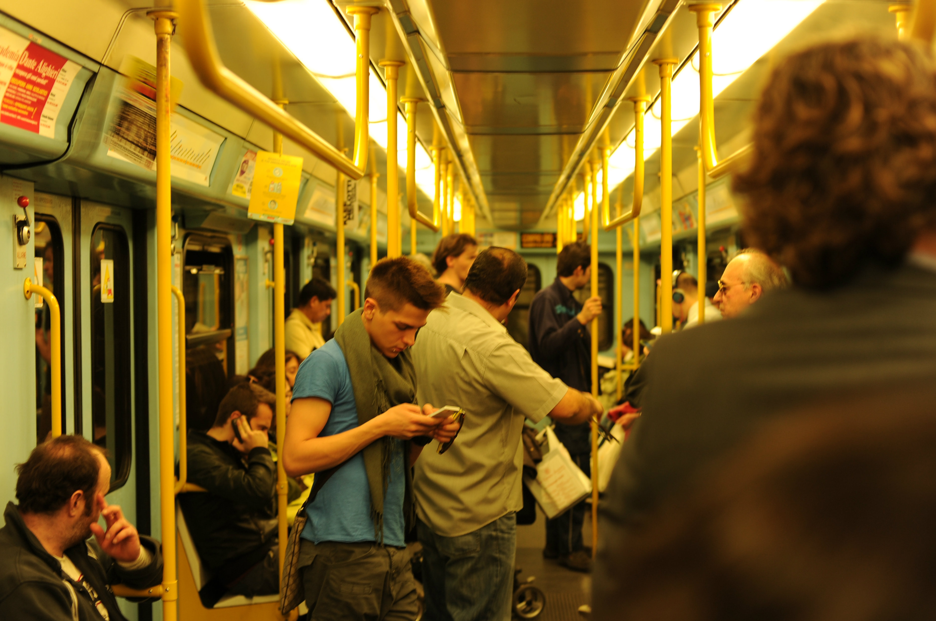 In Milano!